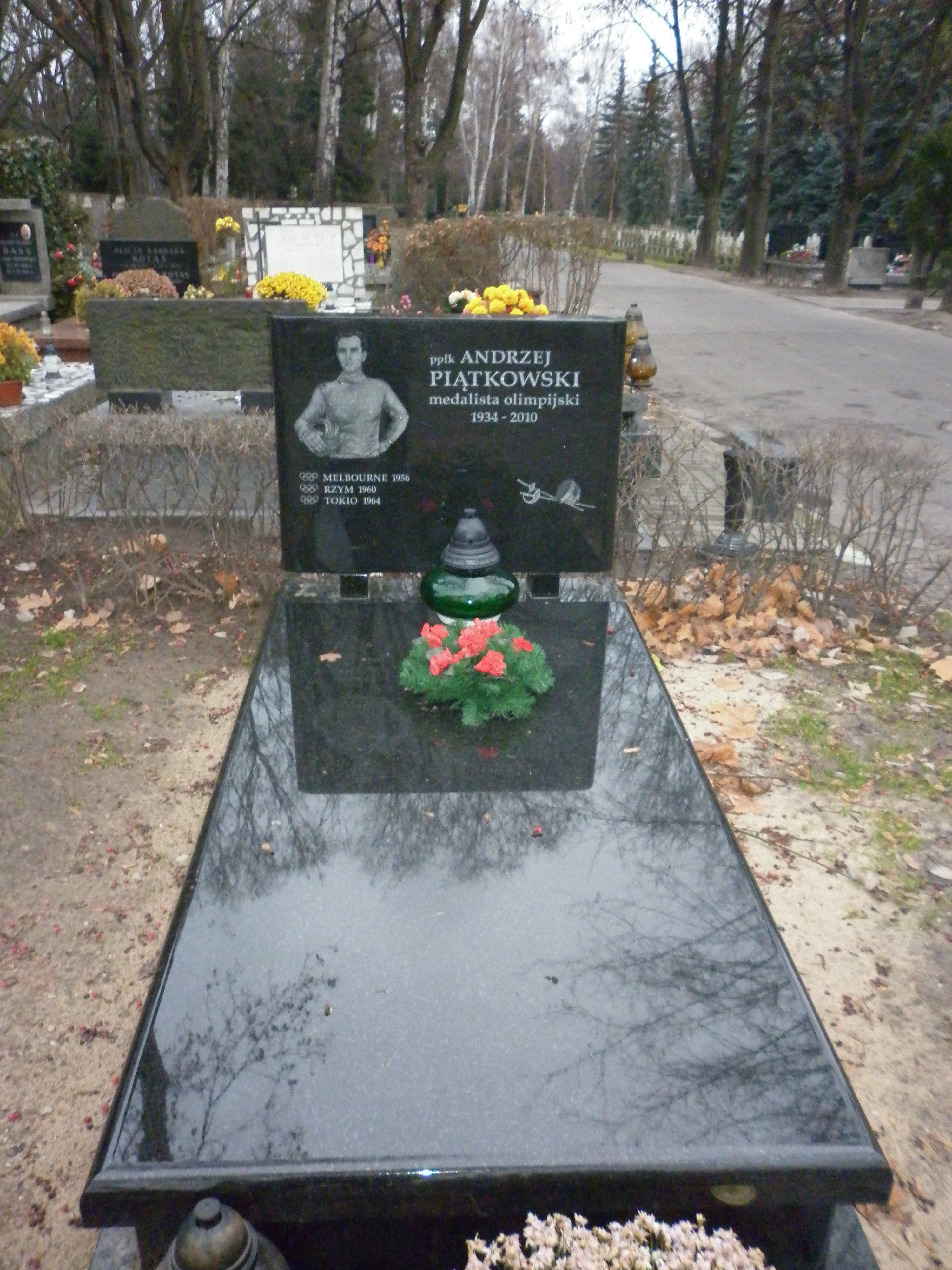 Grób Andrzeja Piątkowskiego na Wojskowych Powązkach